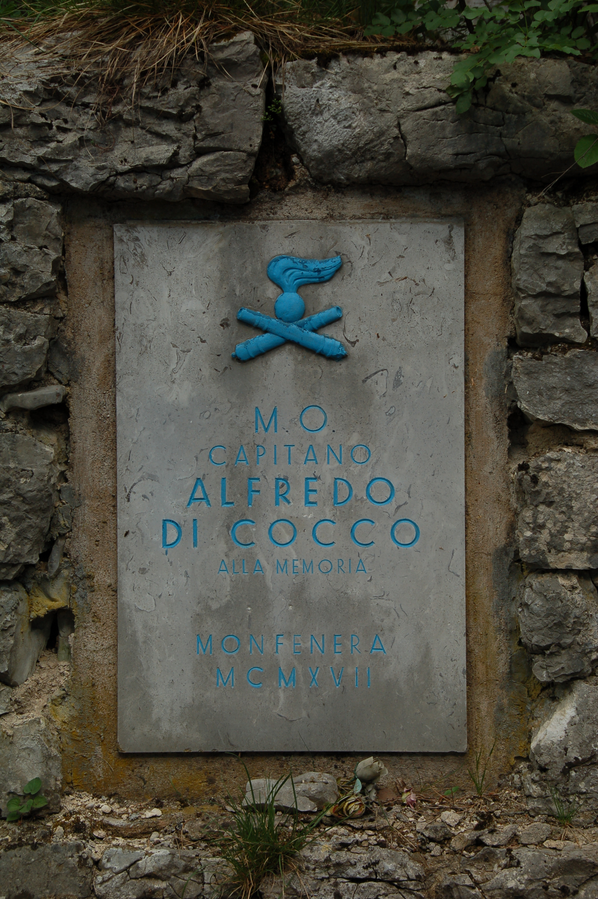 Lapide situata sulla Strada degli Artiglieri a Rovereto